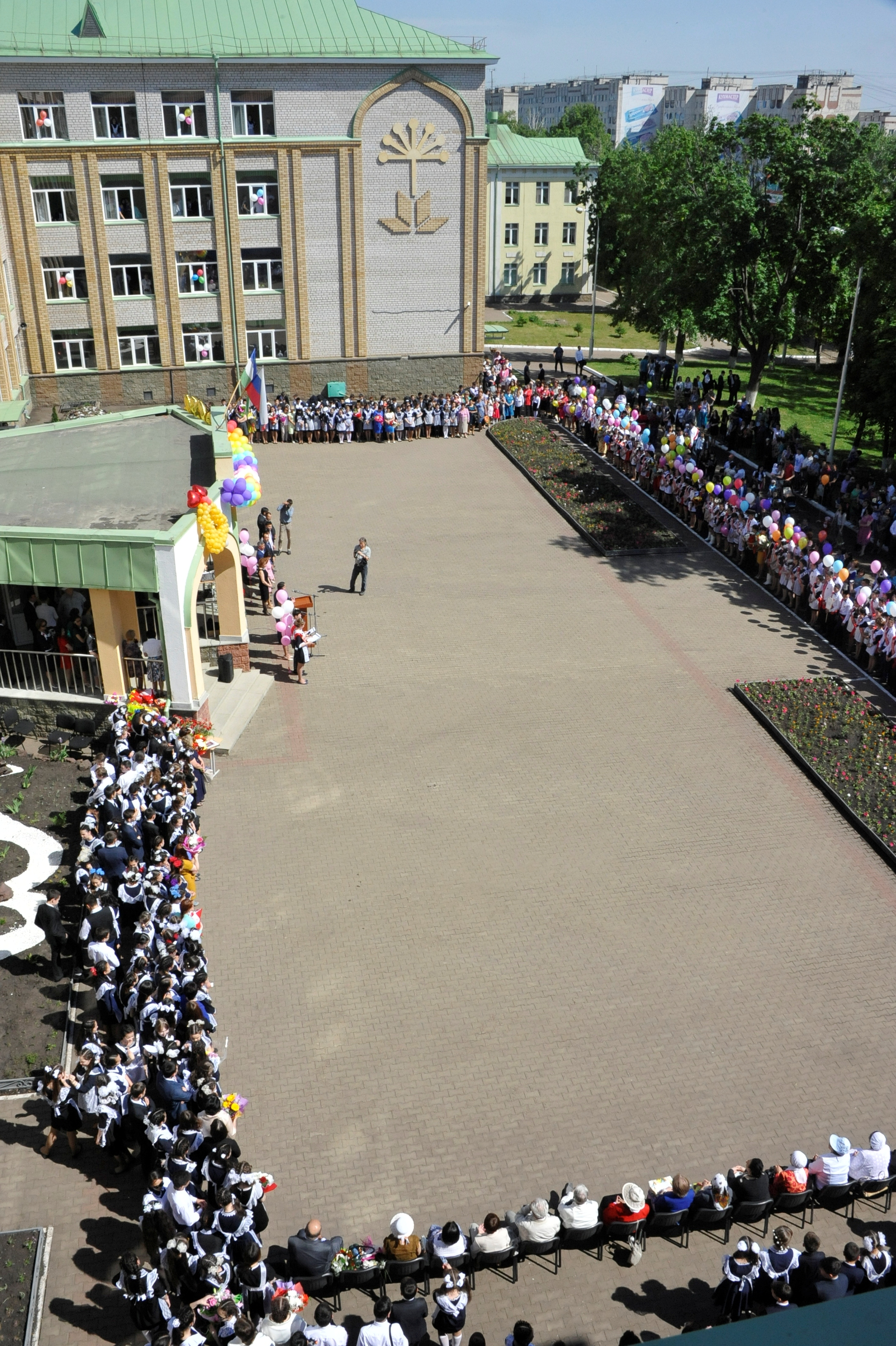 Вручение премии имени Султангареева в республиканской гимназии им. Рами Гарипова, 2016 год.